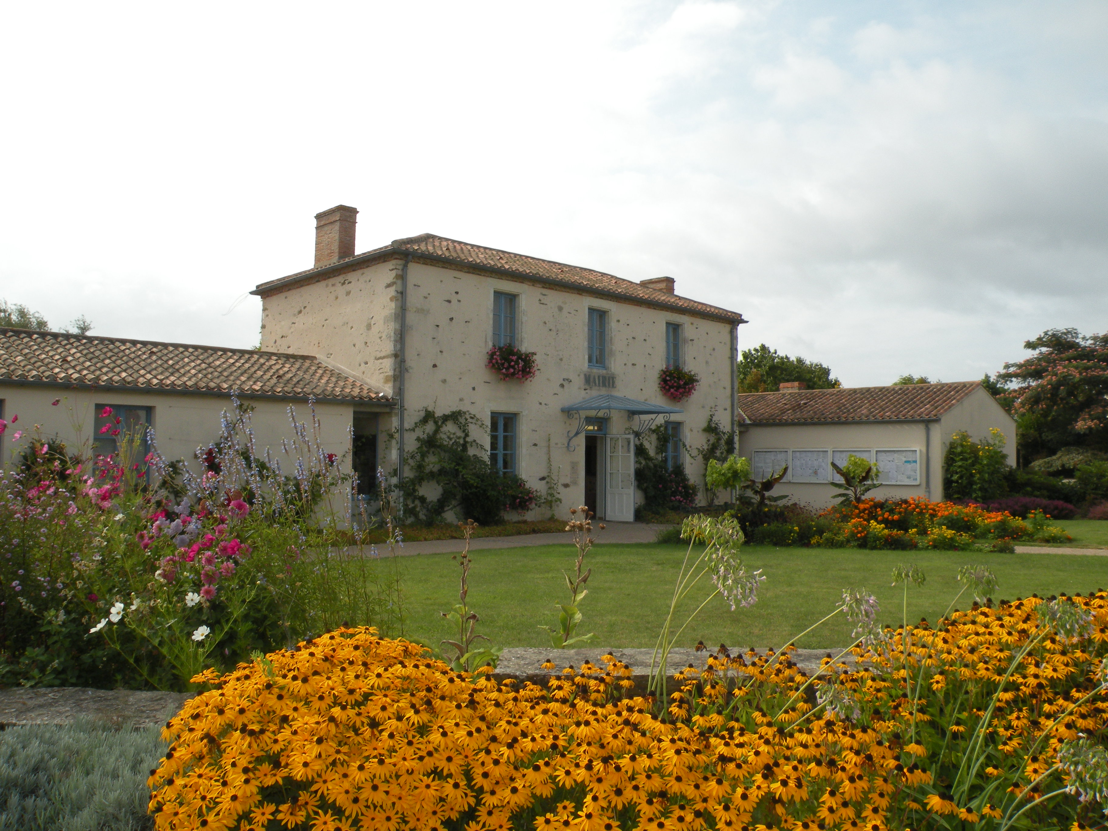 mairie de Givrand, vendée france